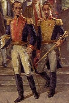 Simón Bolivar, Francisco de Paula Santander y otros proceres de la independencia saliendo del Congreso de Cúcuta (imagen)